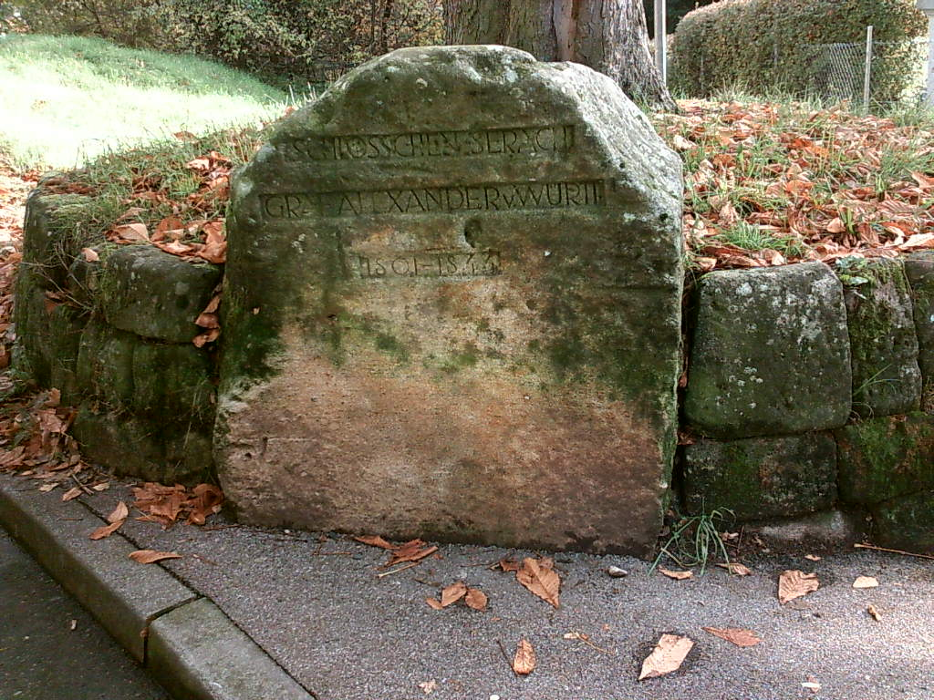 Gedenkstein vor dem Schloss Serach, 2005